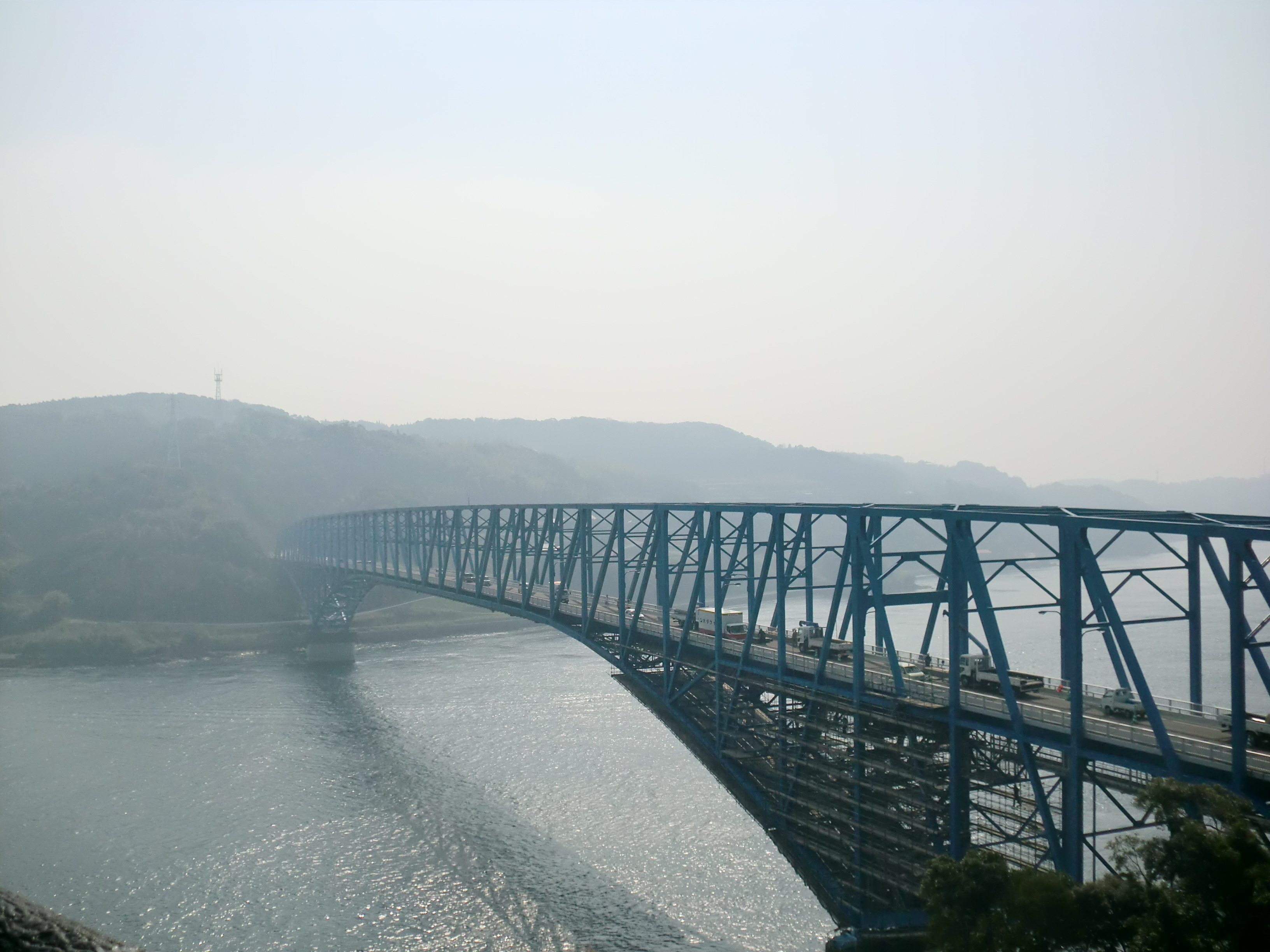 黒之瀬戸大橋。長島町側から撮影。対岸は阿久根市。